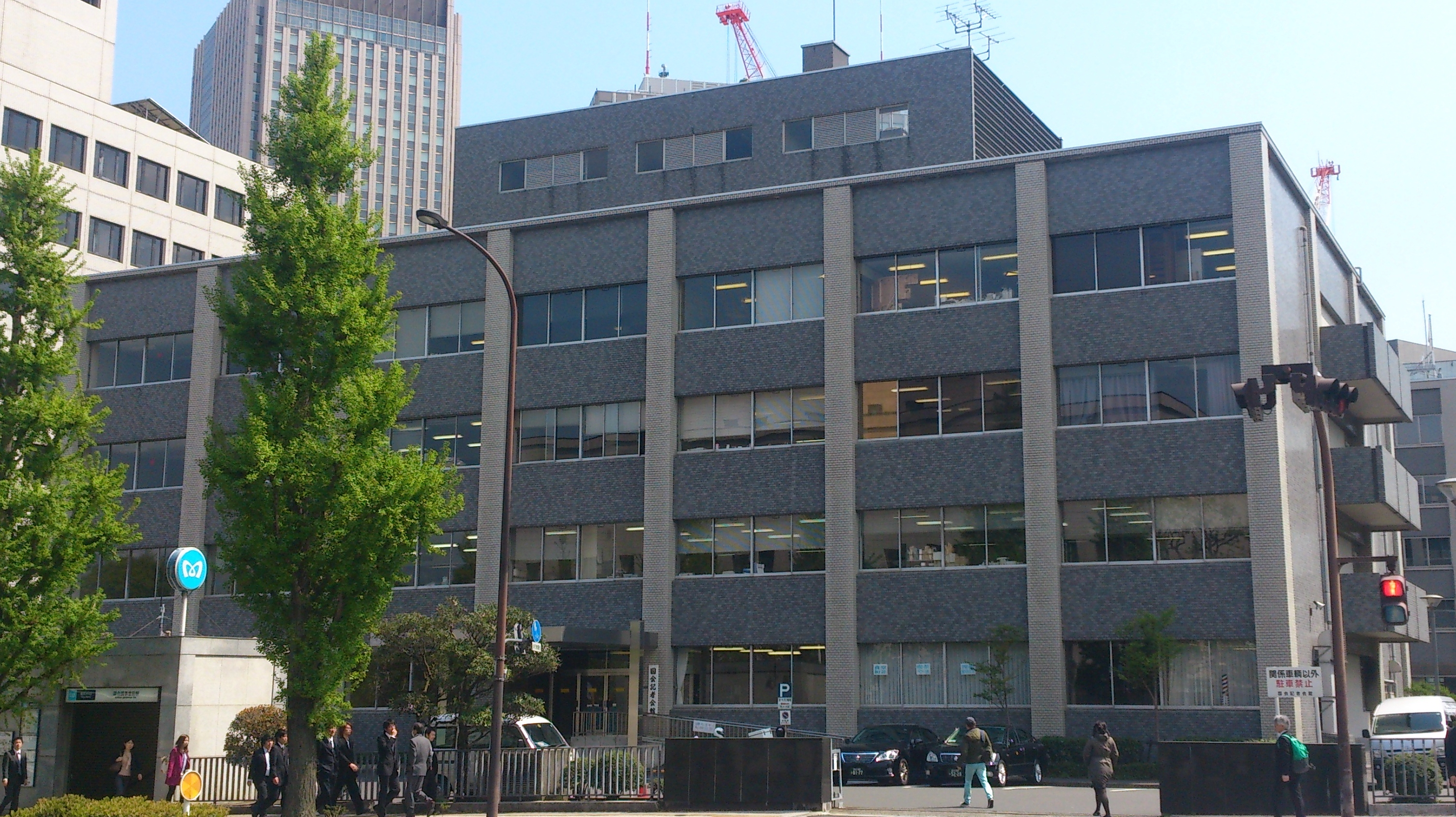 国会記者会館の全景。